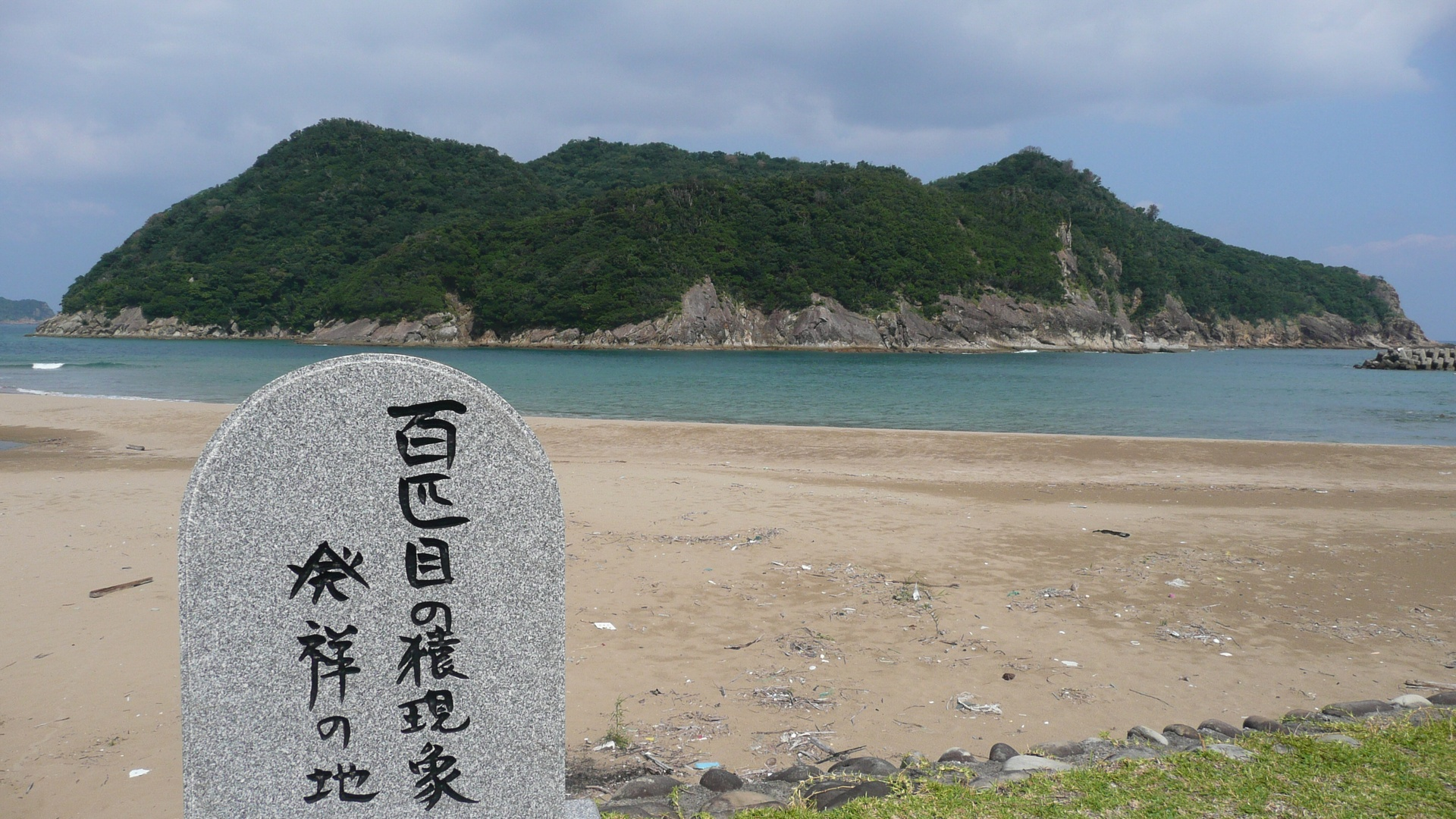 Kōjima Insel (Kushima Stadt, Miyazaki, Japan)